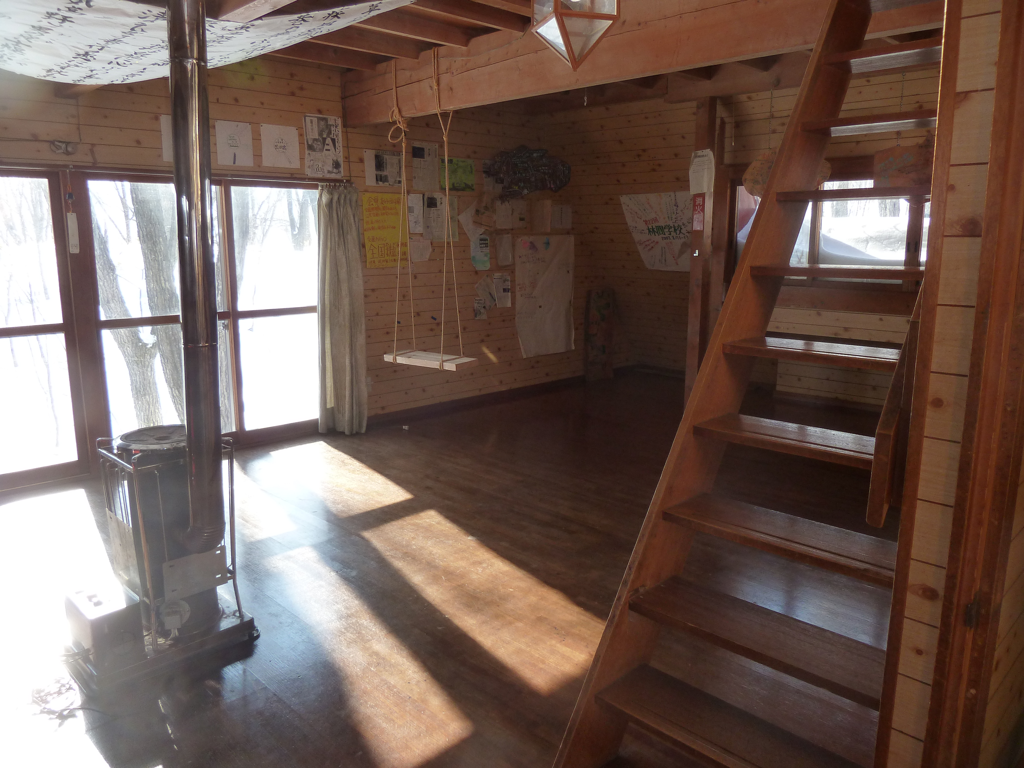 北海道大学恵迪寮と士幌町で共同運営するロッジ「士幌小屋チセ・フレップ」の一階。